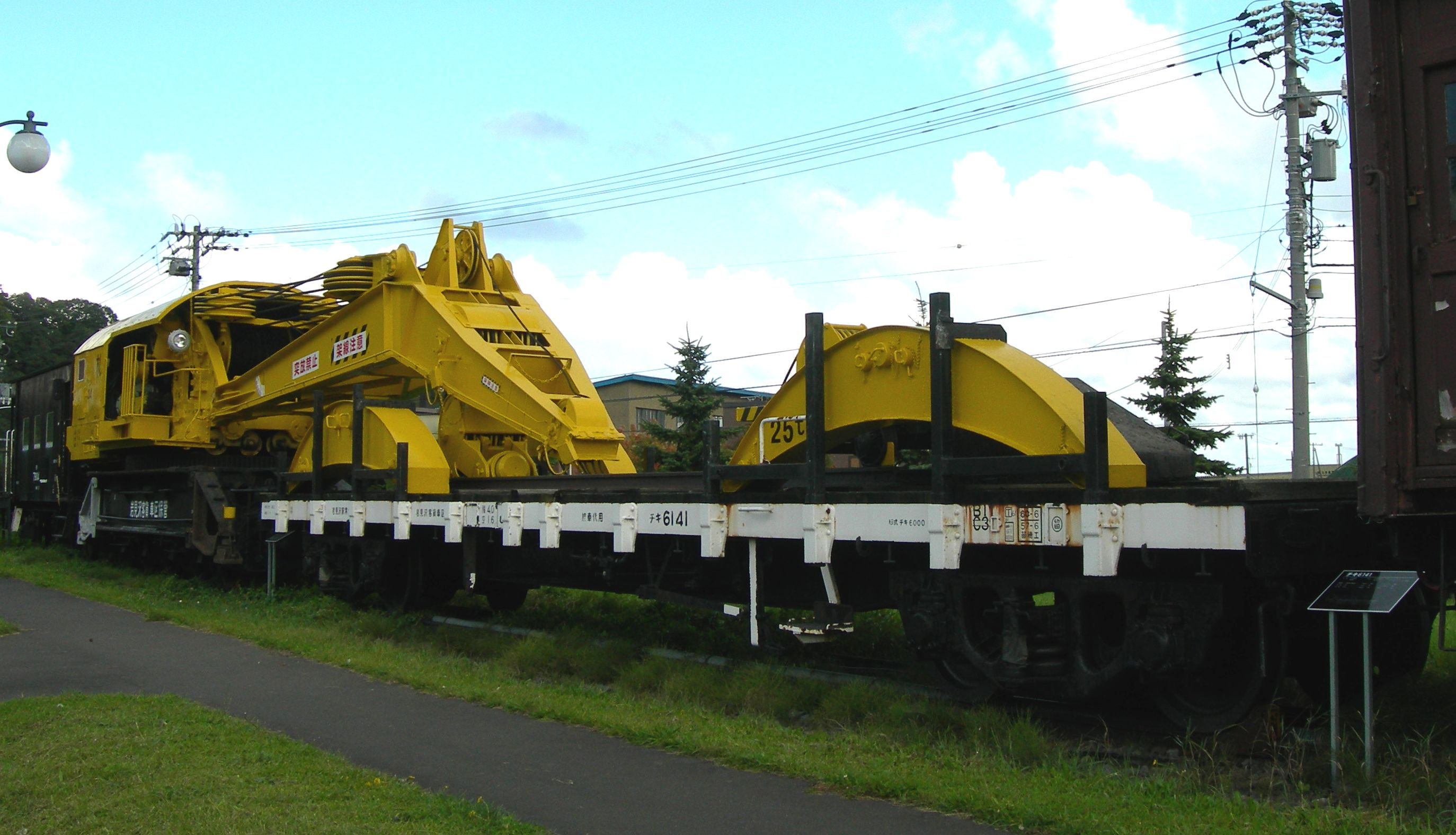 チキ6000形（チキ6141） - 操重車の控車/30形（ソ34） - 操重車